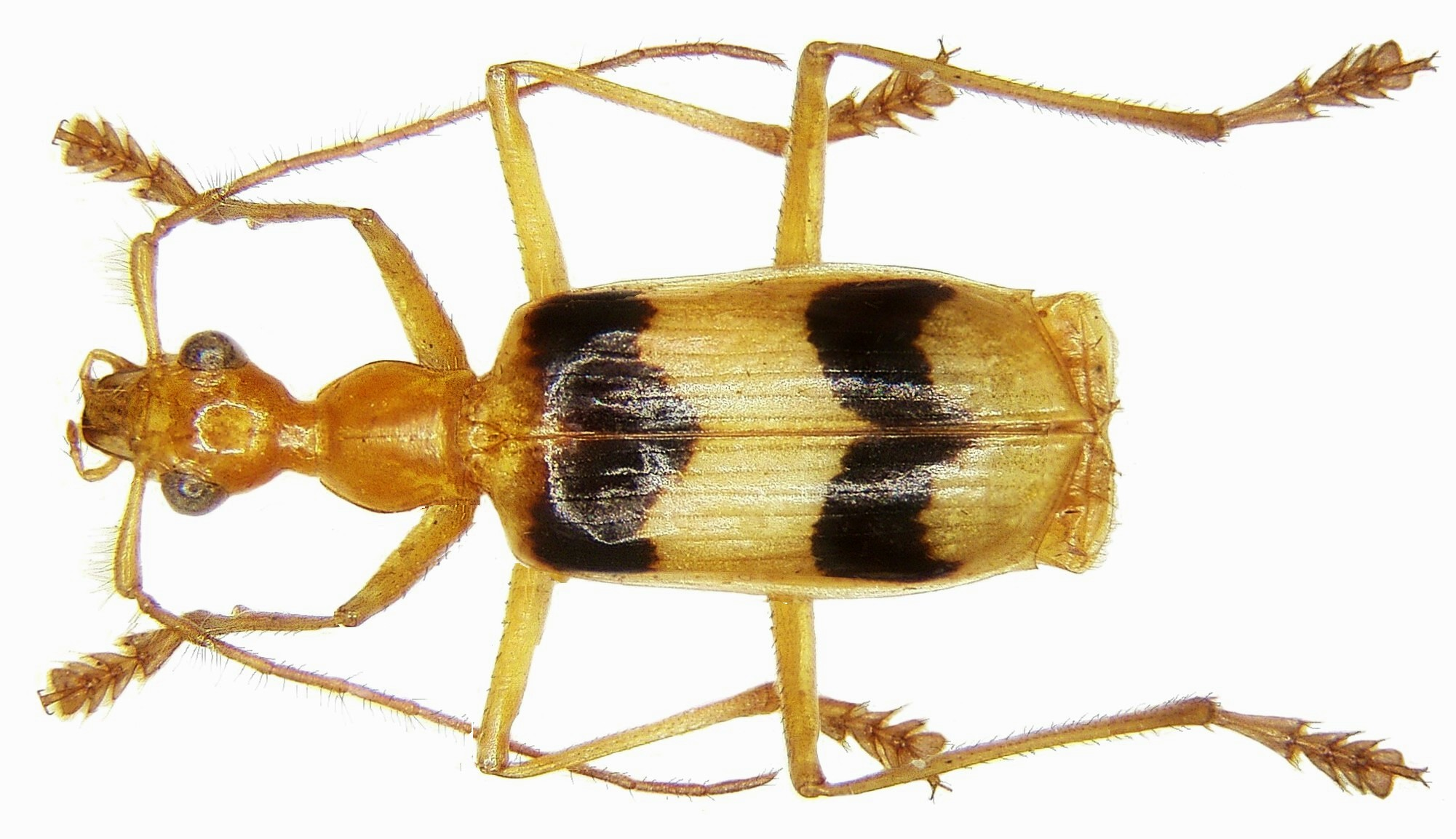 Calophaena cf. bicincta Familie: Carabidae Grösse: 12 mm Fundort: Costa Rica, Tarcoles leg. U.Schmidt, 1996; det. W.Lorenz, 2008 Foto: U.Schmidt, 2008